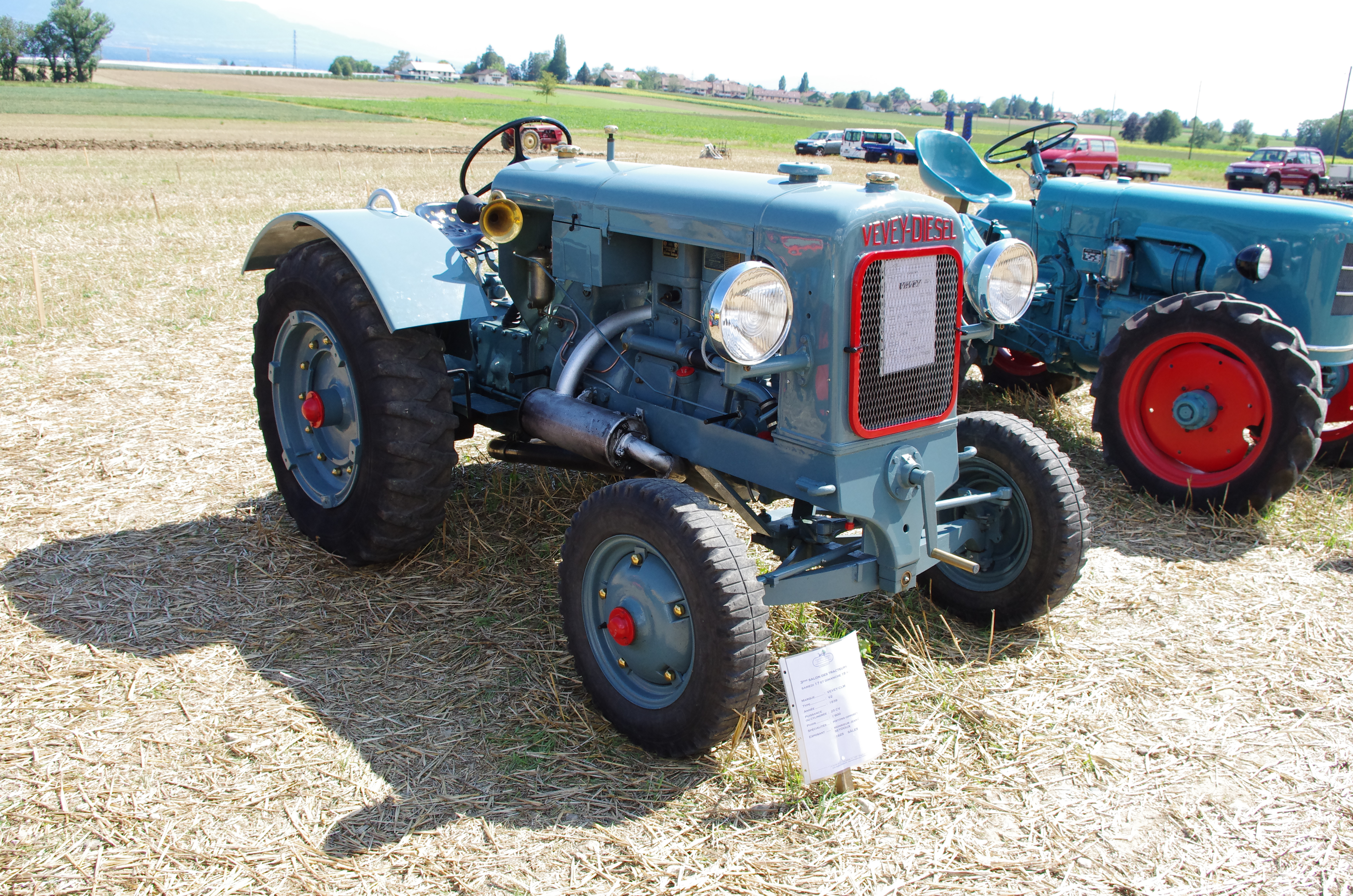 Tracteur Vevey CLM V2 - 1939 - droite